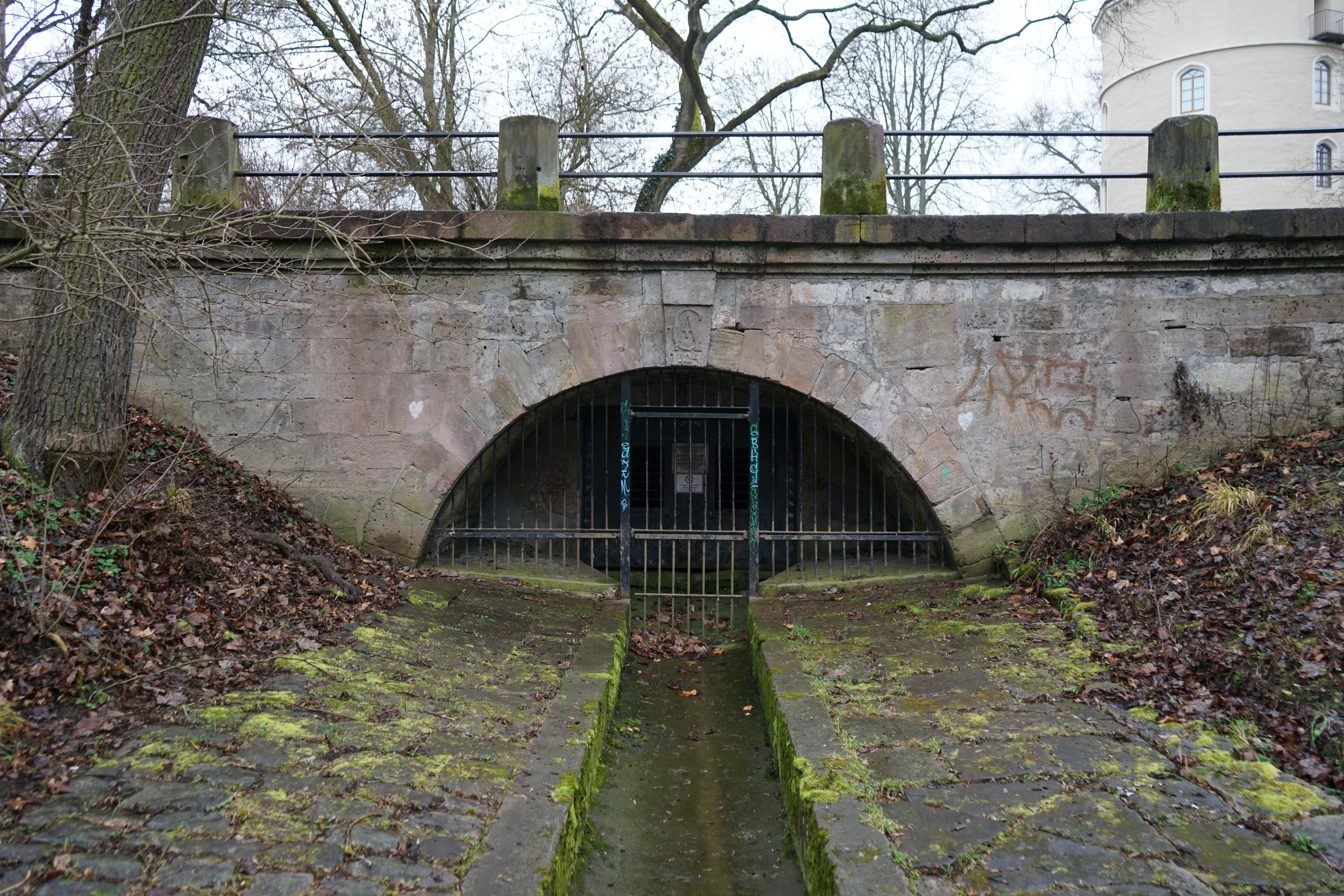 Frühester überwölbter Teil des früheren Schützengrabens an seiner Mündung in die Ilm. Der Schützengraben ist ein mittelalterlichen Hochwasserabflussgraben, der den Wilden Graben (Ilm) aufnahm, damit dieser nicht mehr in den Lottenbach und mit diesem durch die Altstadt floss. Ab 1824 wurde der Schützengraben auf Wunsch von Carl August von Sachsen-Weimar-Eisenach (Initialien „CA“ im Schlusstein) und nach Plänen von Clemens Wenzeslaus Coudray überwolbt. Der letzte Abschnitt am heutigen Sophienstiftsplatz wurde erst 1880 fertig überwölbt.